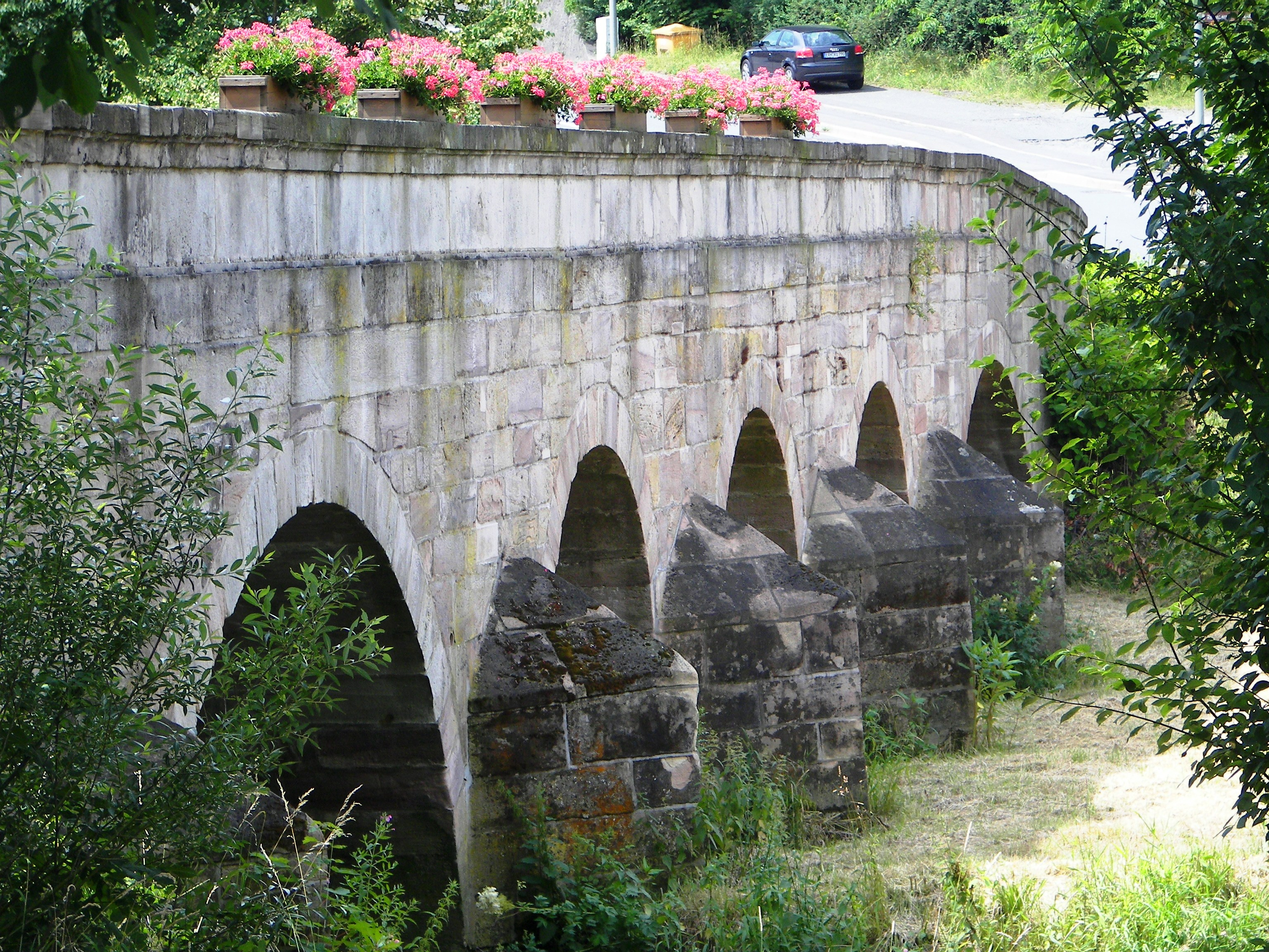 Alte Brücke in Untersteinach (Lks. Kulmbach)